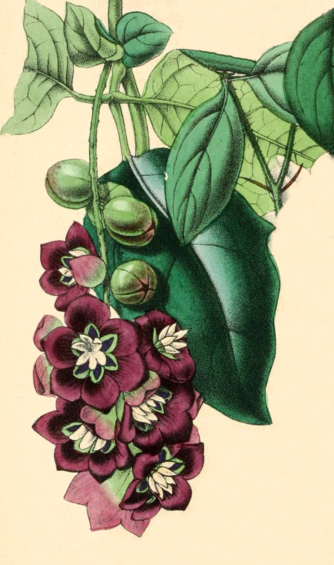 Lardizabala biternata Ruiz et Pav. La Belgique horticole, journal des jardins et des vergers by Charles François Antoine Morren. Liège [Luik], La Direction Générale, 1853, volume 3. Hand-coloured lithograph by G. Severeyns (sheet 152 x 236 mm). Slight offset